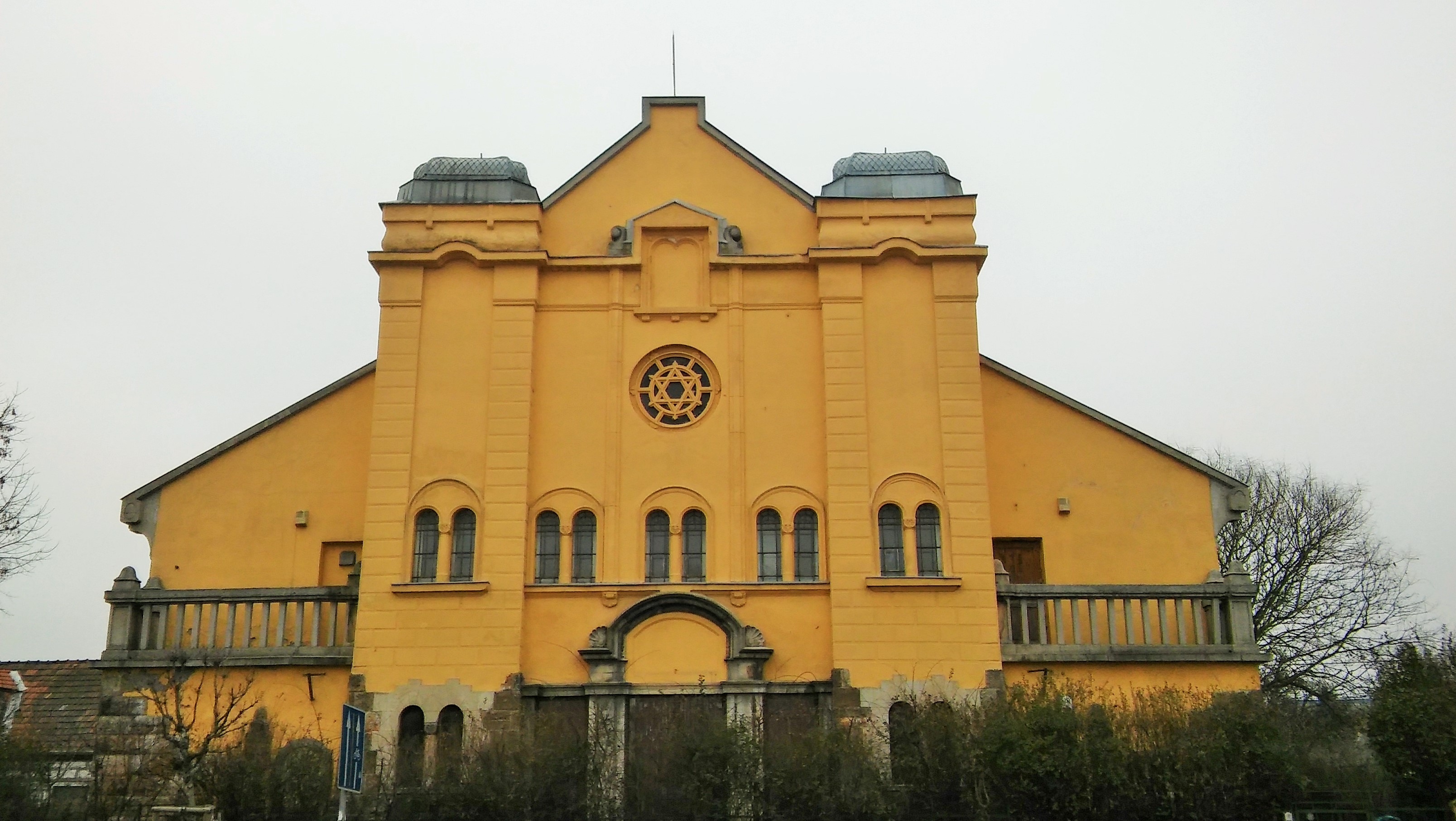 Rákospalotai zsinagóga